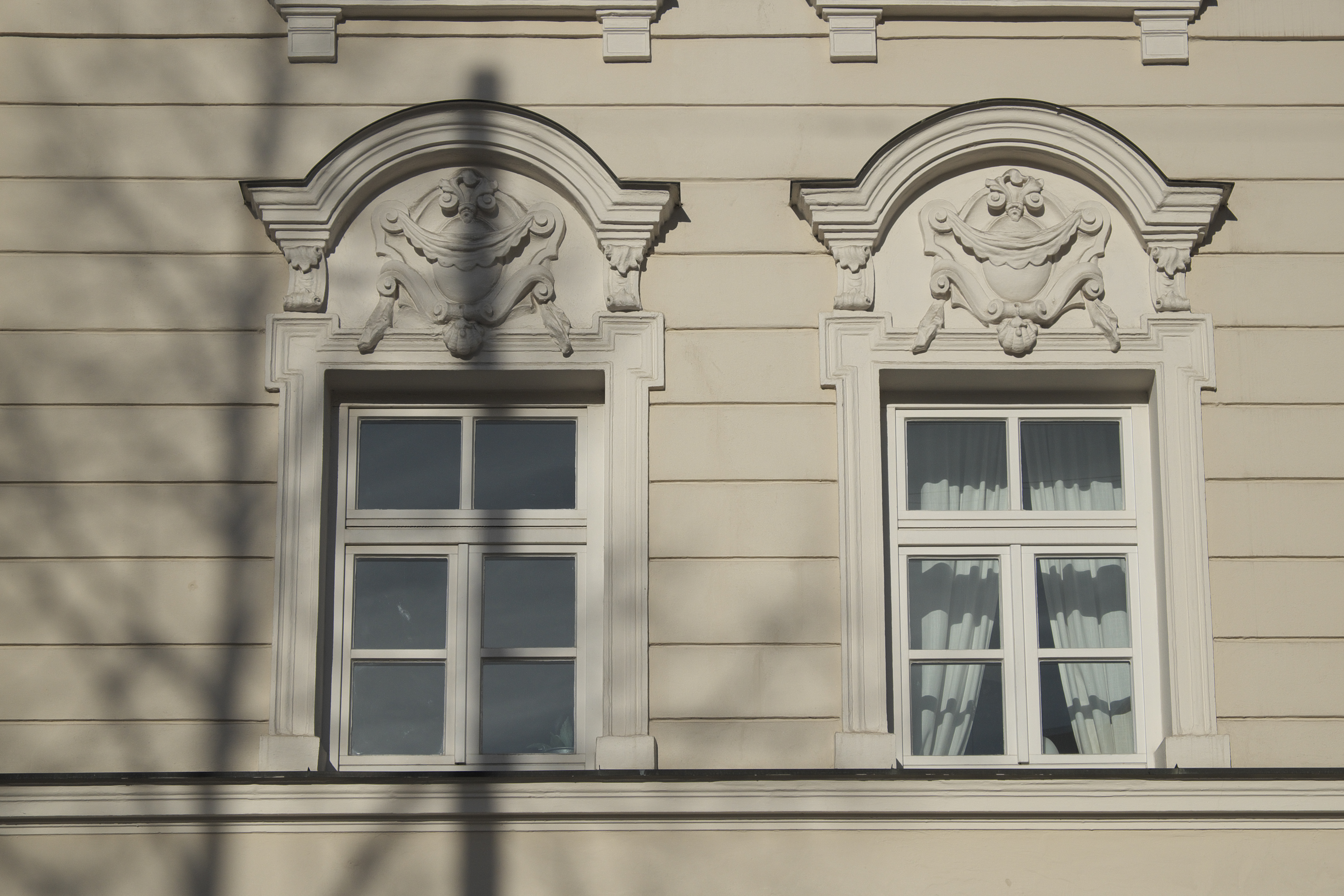 Mietshaus in der Wolfgangstraße 5 in Haidhausen im Stadtbezirk Au-Haidhausen in München (Bayern/Deutschland), um 1890, mit reichem Stuckdekor